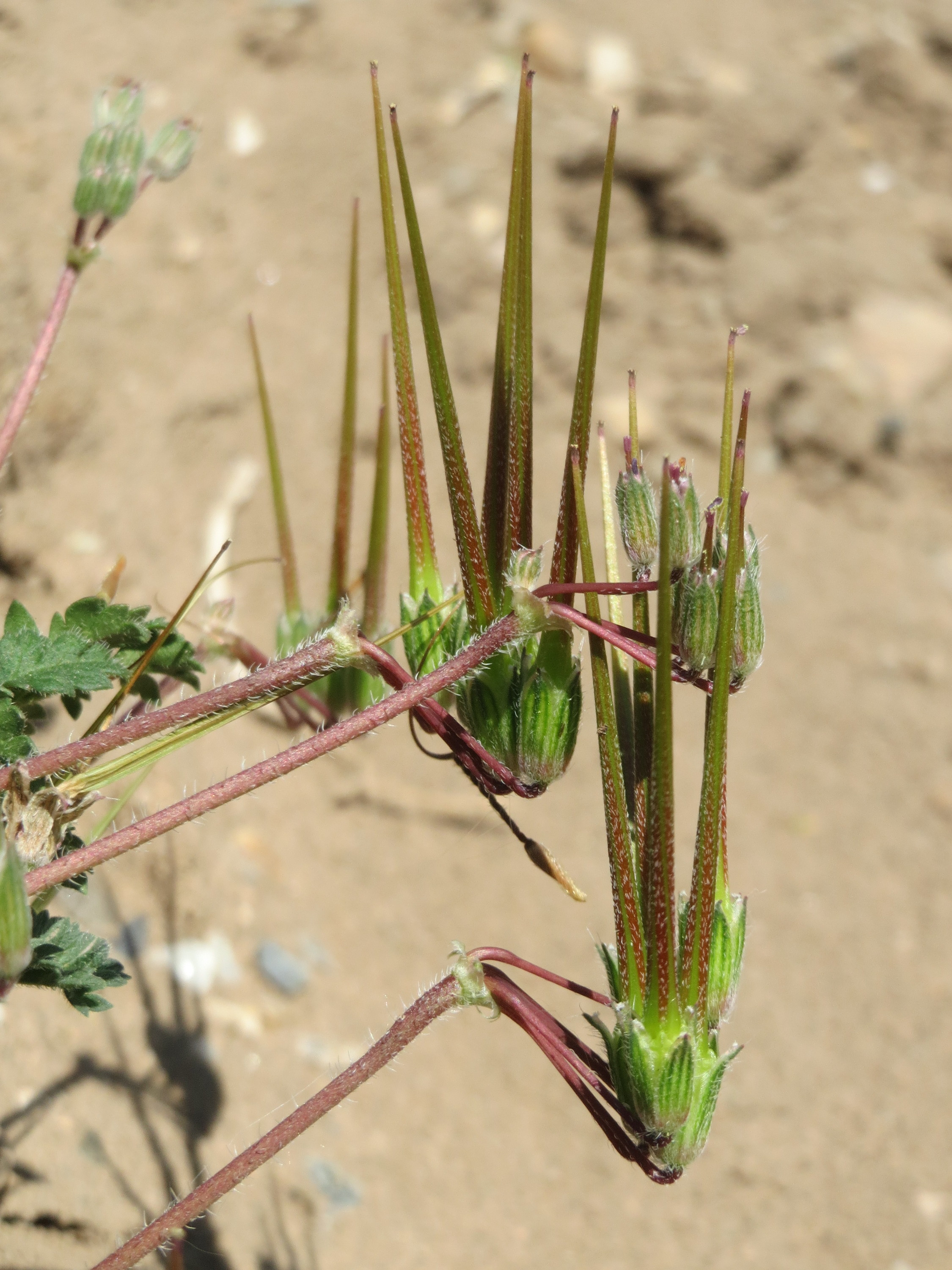 Gewöhnlicher Reiherschnabel (Erodium cicutarium) auf einem Sandhügel einer Baustelle in Hockenheim